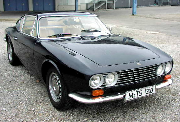 Ford OSI